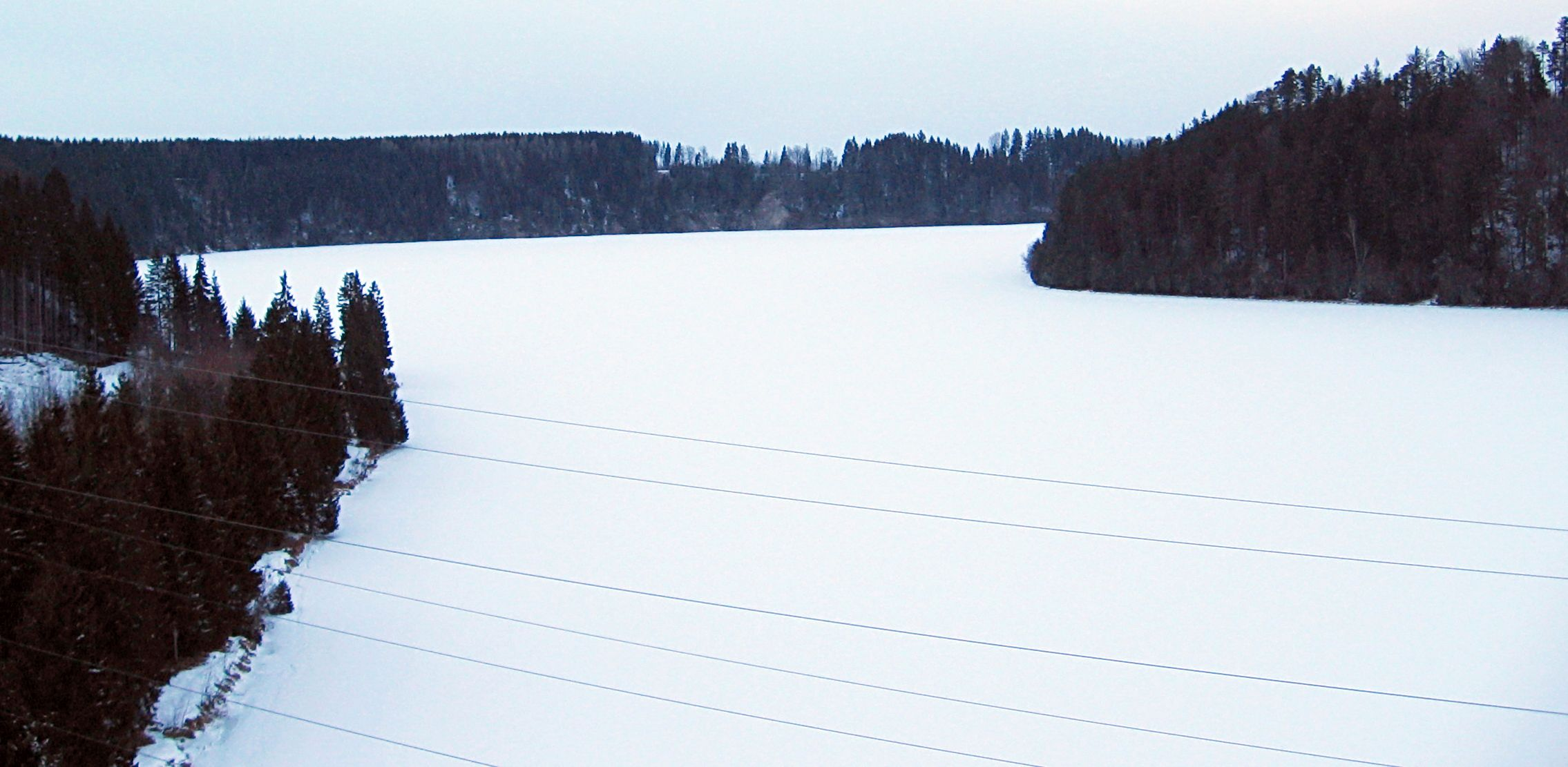 Zugefrorene Lechstaustufe 6 im Dornautal bei Schongau im Winter, gesehen von der sie überquerenden Lechtalbrücke (Bundesstraße 17/472) Richtung Norden